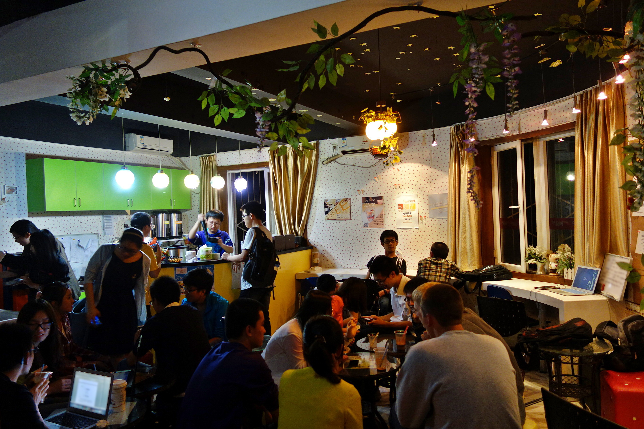 位于西安交通大学仲英书院内的品阁，学生自营的咖啡店。